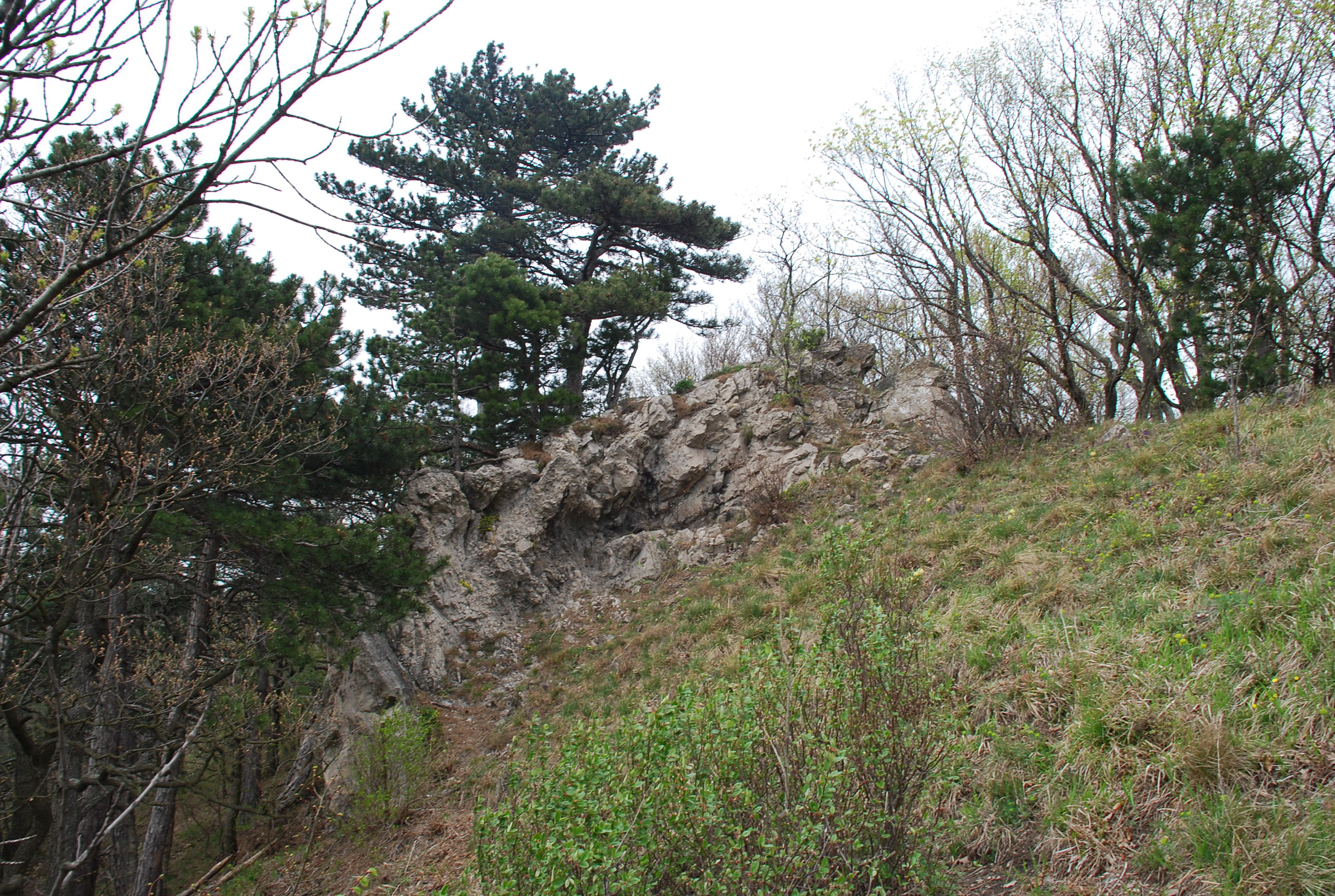 Teufelstein im Wienerwald, die parallelen Risse im Fels wurden als Furchen der Teufelskrallen interpretiert